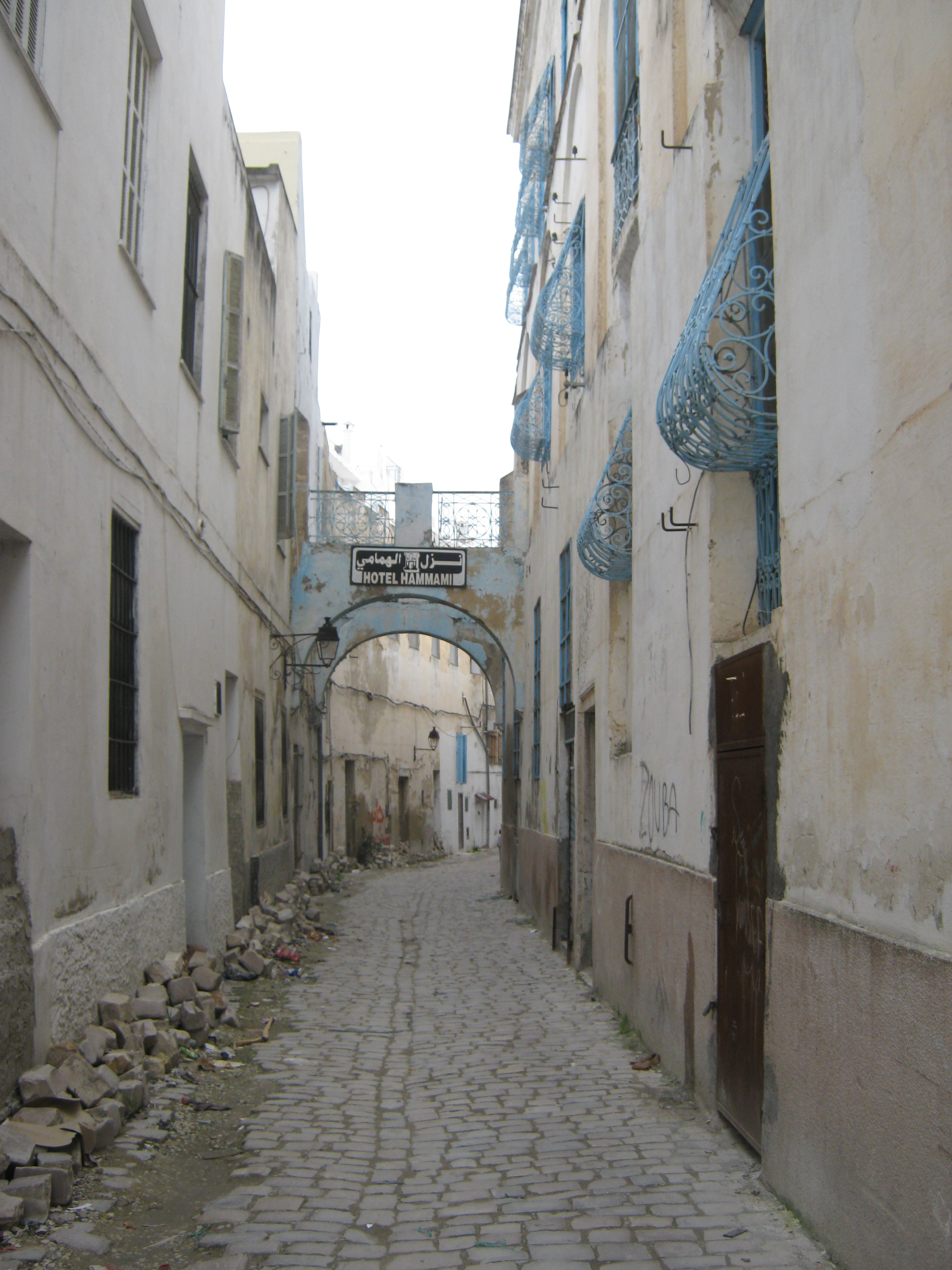 rue el mechnak